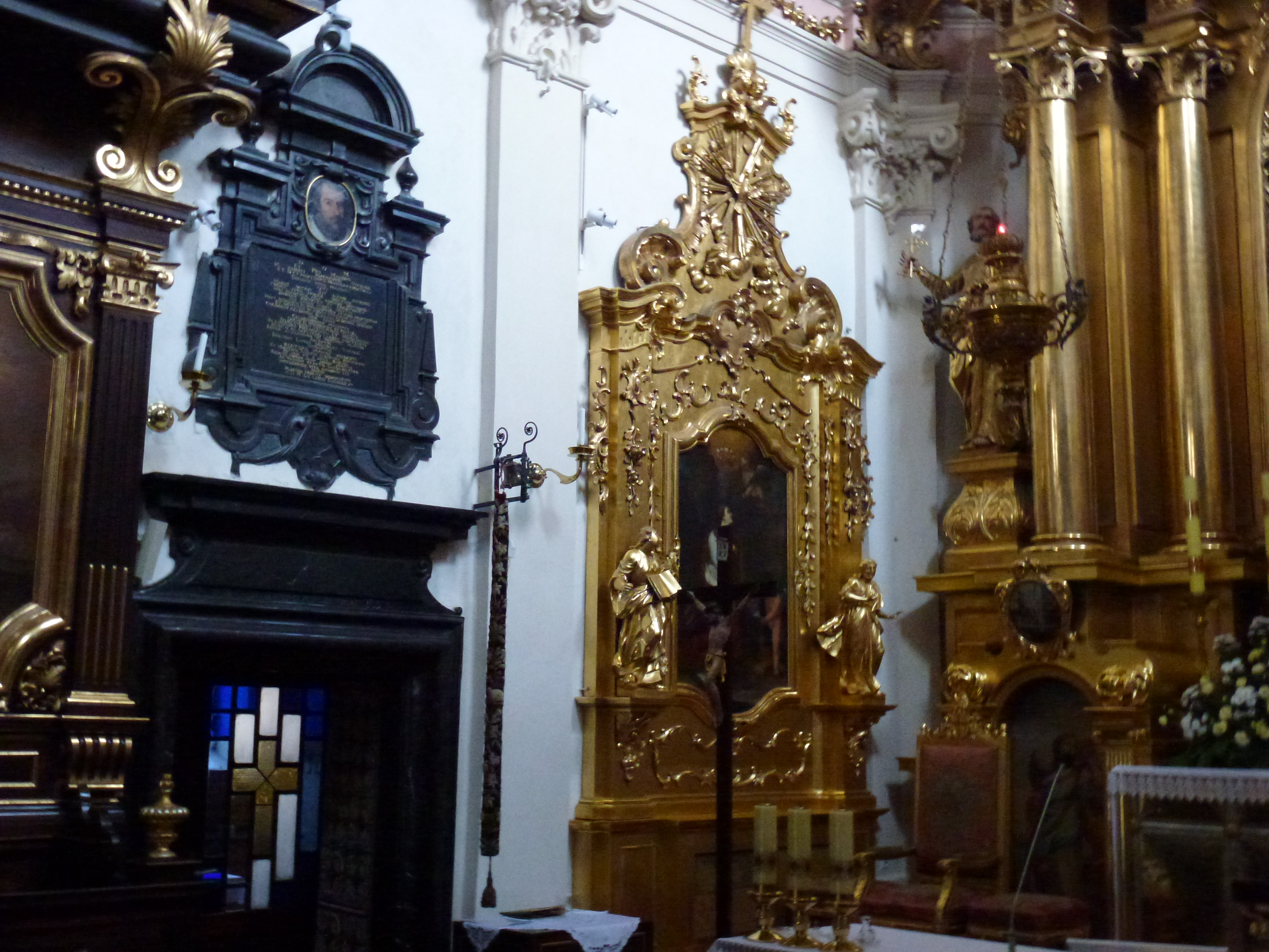 Wejście do zakrystii Bazyliki św. Floriana w Krakowie. Po lewej stronie u góry - tablica epitafijna Wojciecha Papenkowica